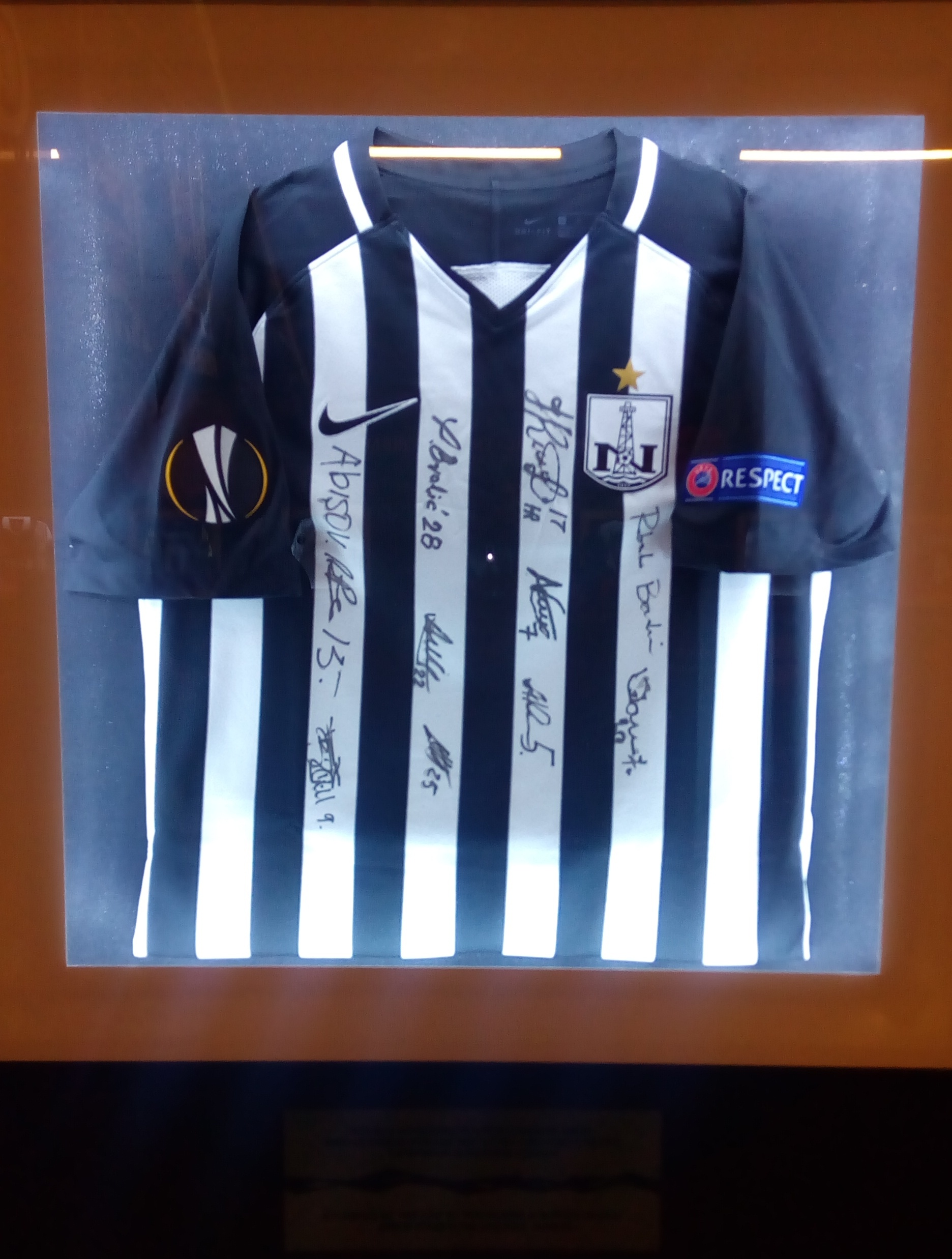 Avropa Liqası Muzeyi Bakıda